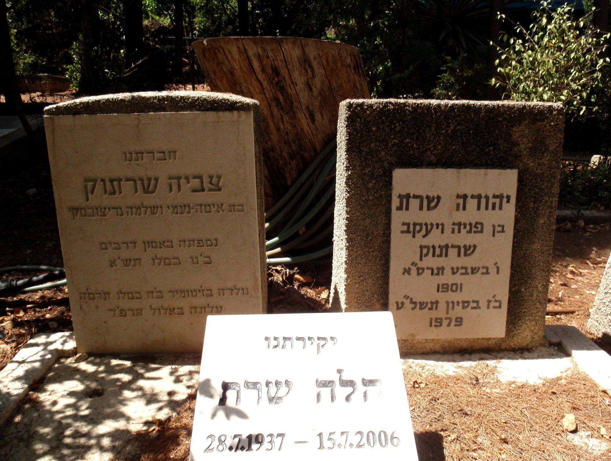 מפגש אלף מילים קבר יהודה שרת